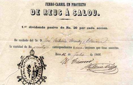 Acció del Ferrocarril de Reus a Salou